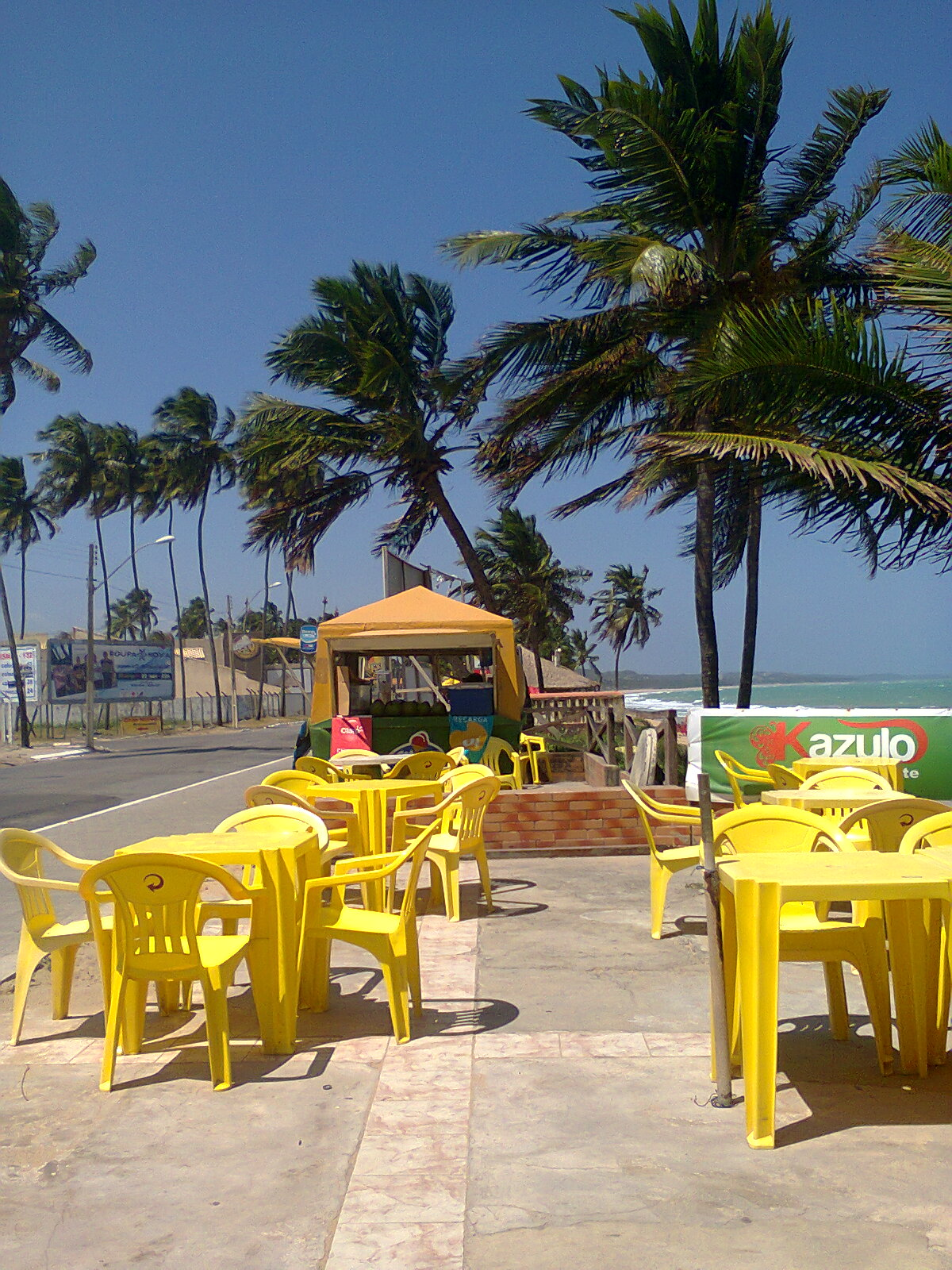 Strandpromenade Cruz das Almas, Maceió